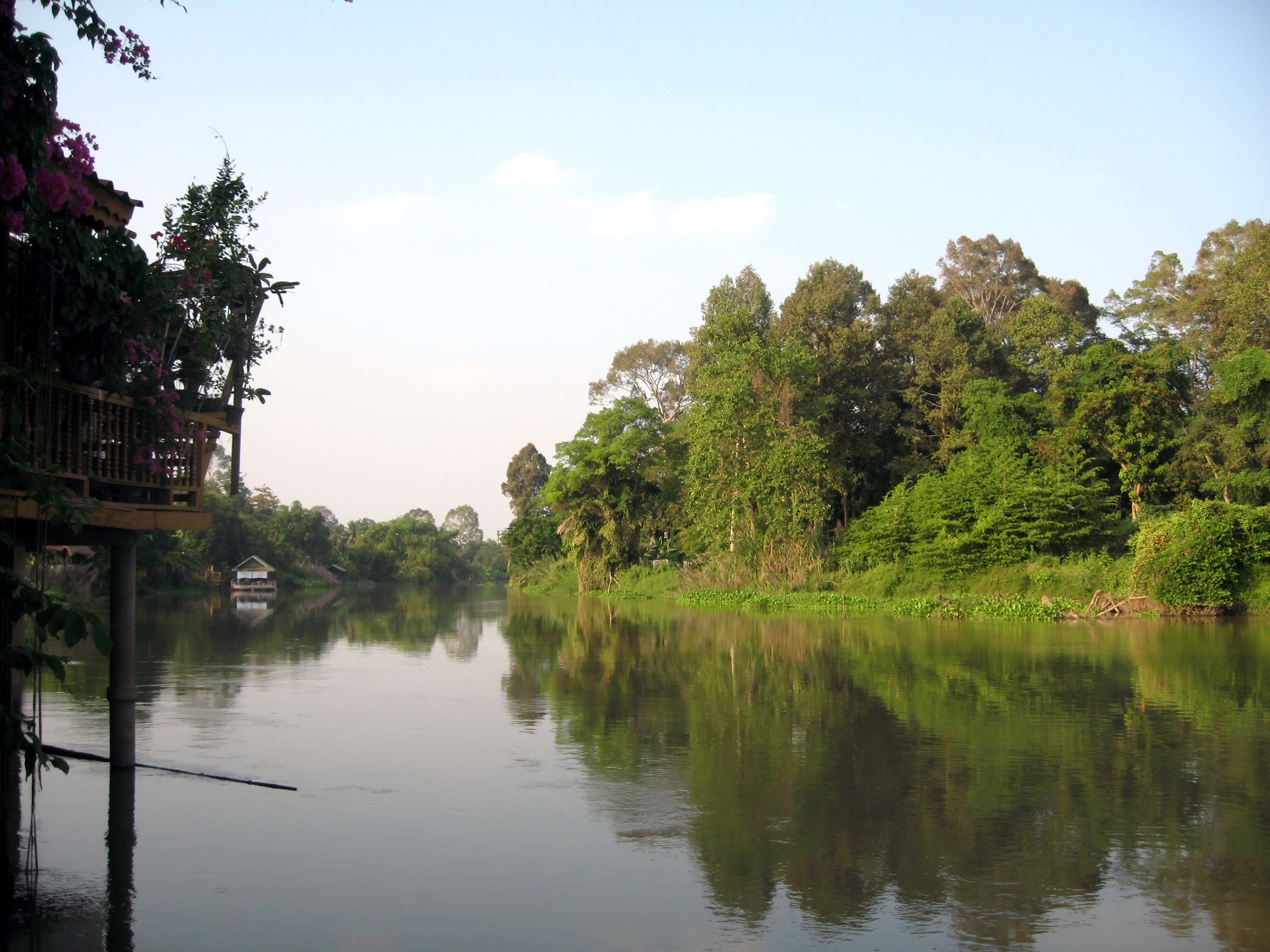 แม่น้ำน้อย